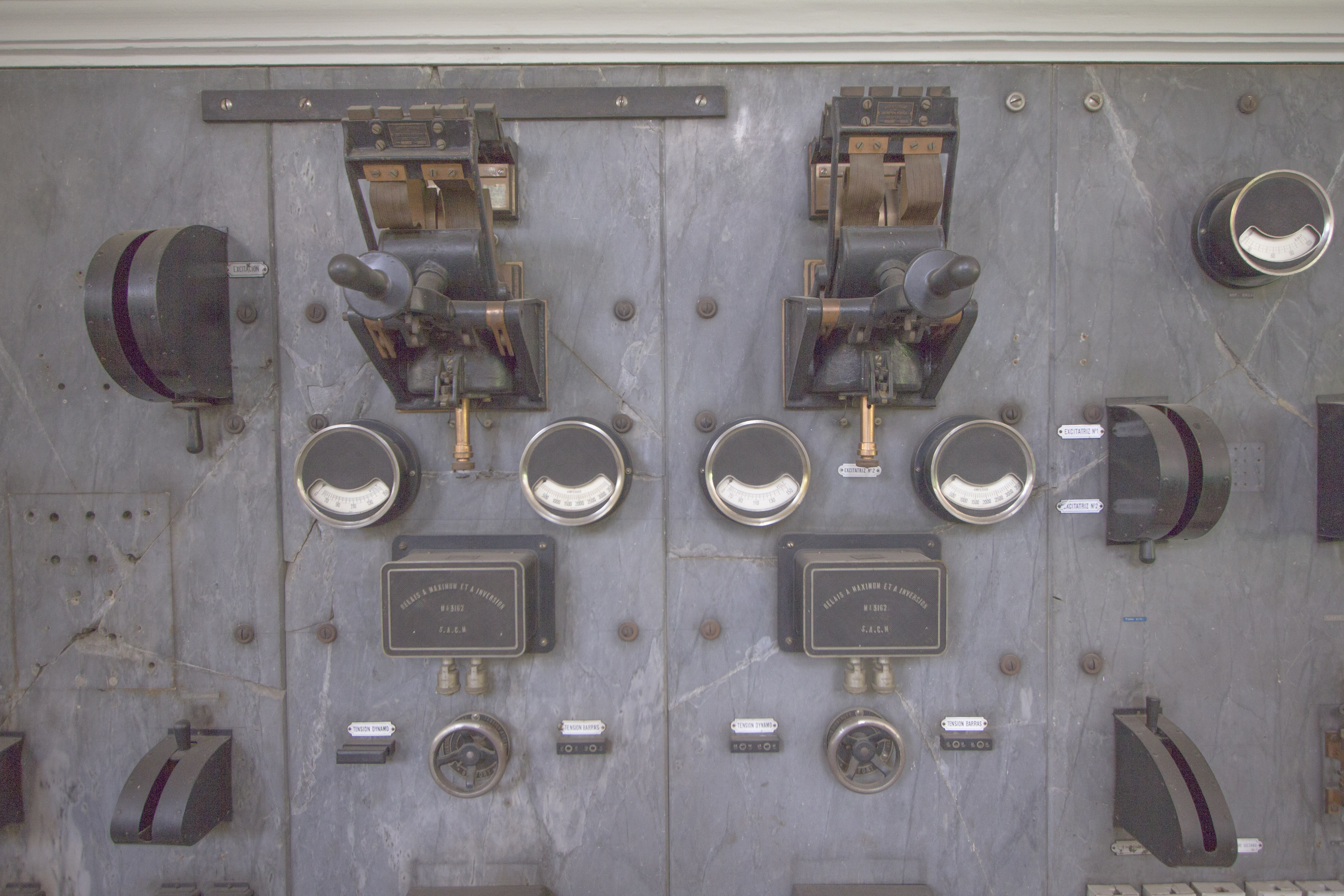 Antic quadre de control a la sala de maquines de la Central hidràulica de Capdella (Pallars Jussà)